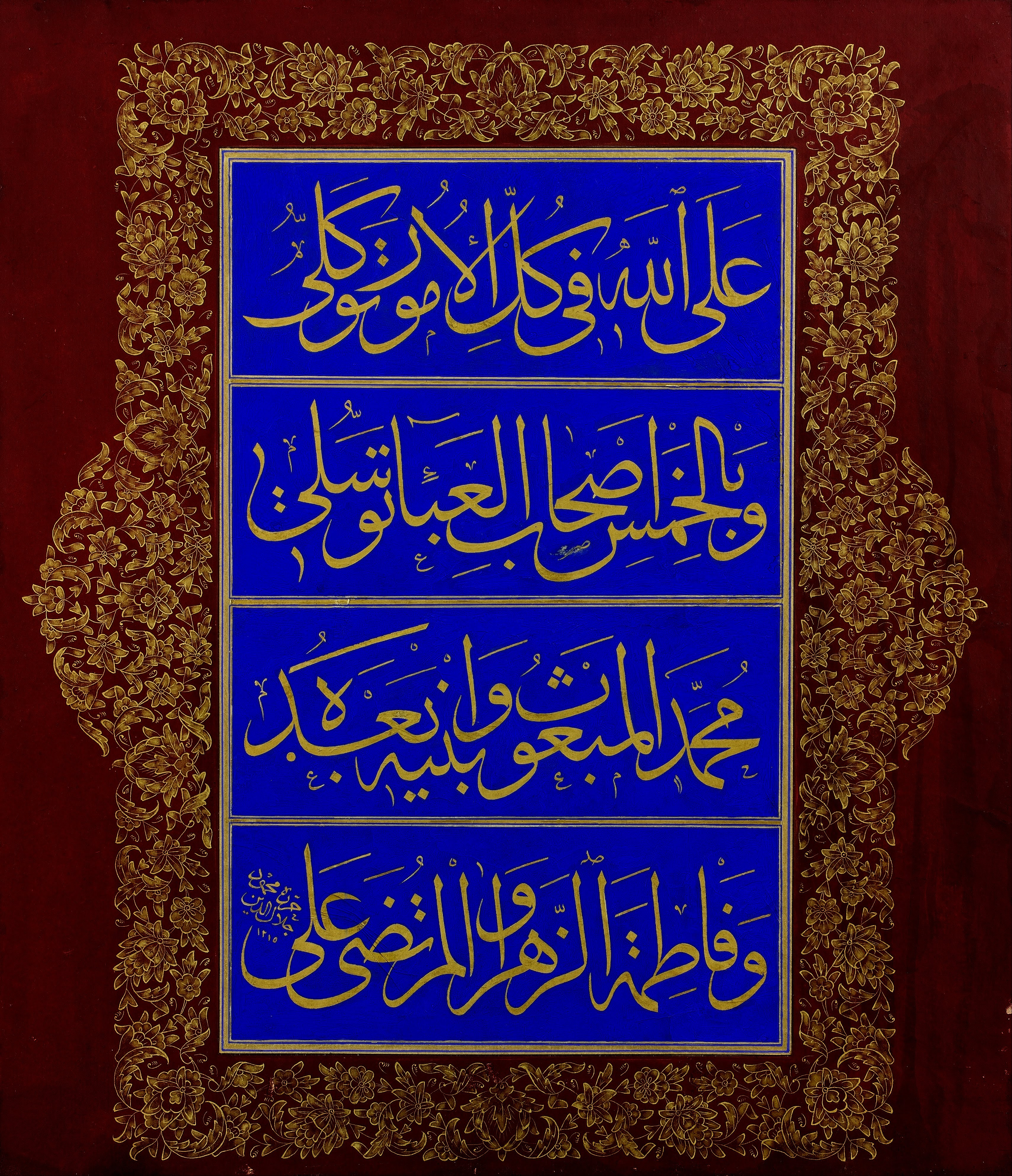 Arabic text reads: على الله في كل الأمور توكلى وبالخمس أصحاب العباء توسلى محمد المبعوث وابنيه بعده وفاطمة الزهراء والمرتضى على